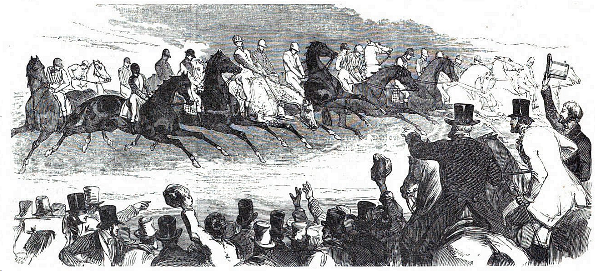 Der Abritt.